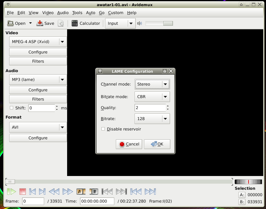 sidux avidemux settings